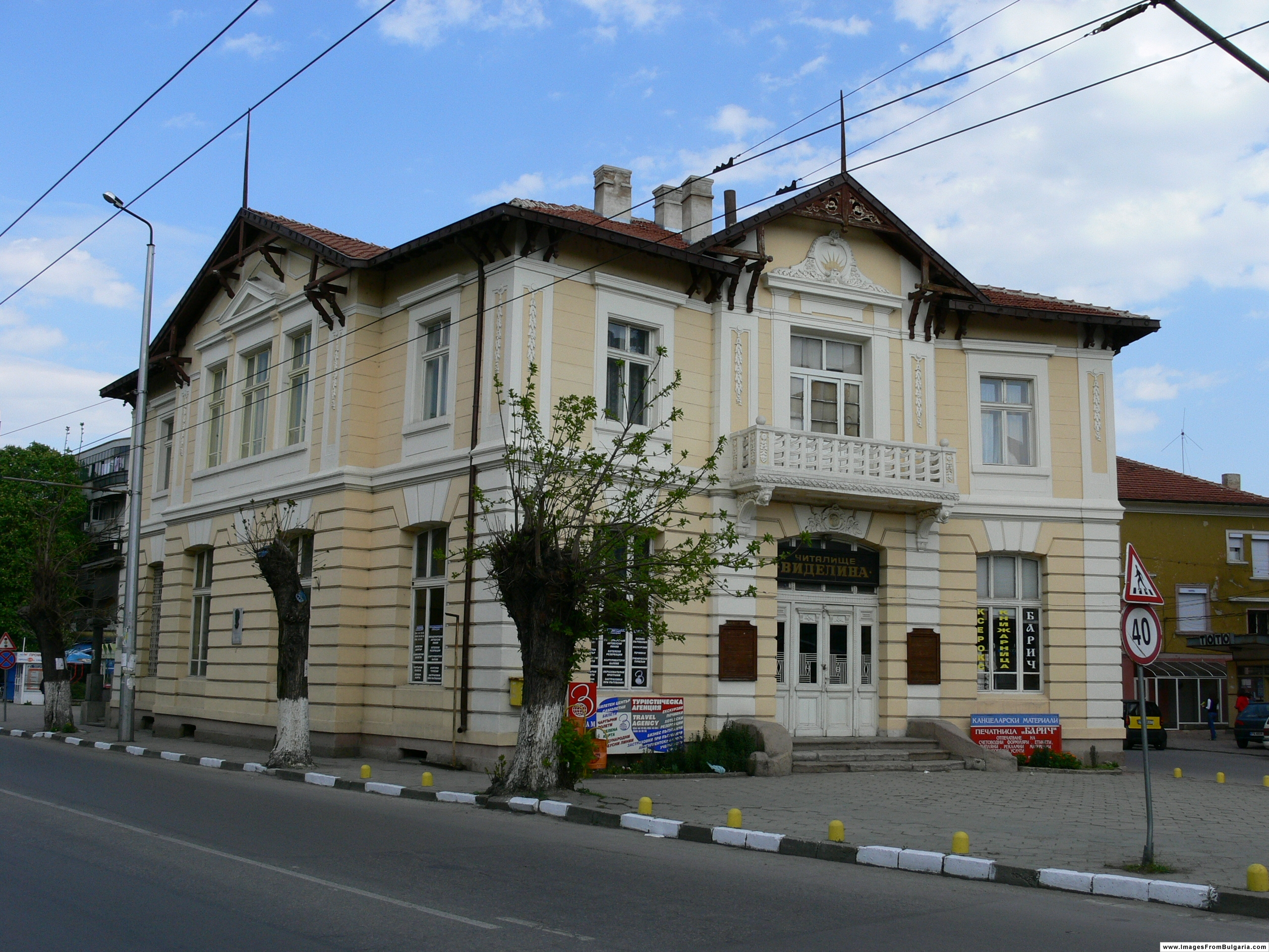 Pazardzhik, Bulgaria